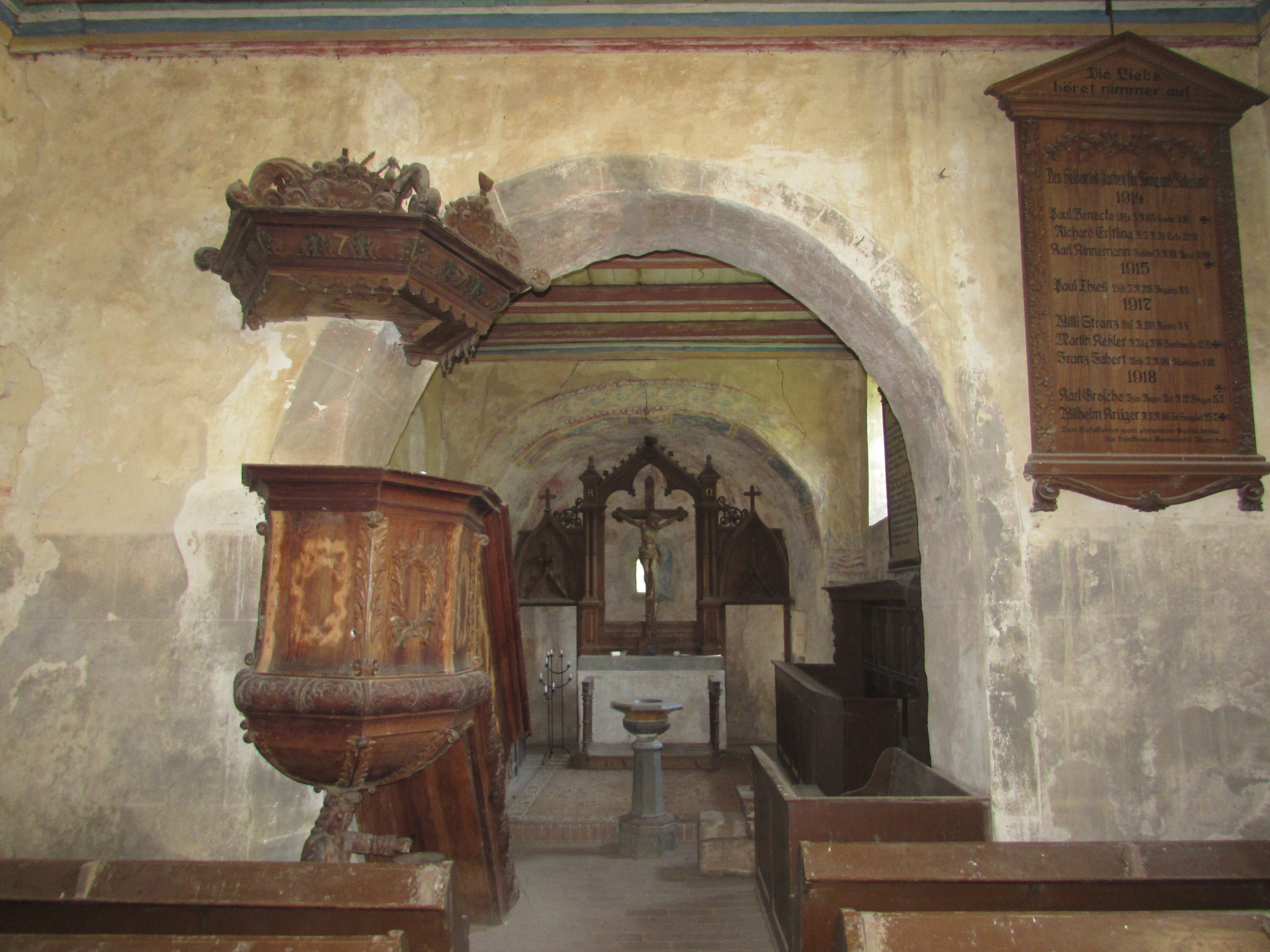 dorfkirche warchau innen